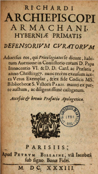 Richardi [Fitzralph] archiepiscopi Armachani, Hyberniae primatis Defensorium ... by Richard Fitzralph, Billaine